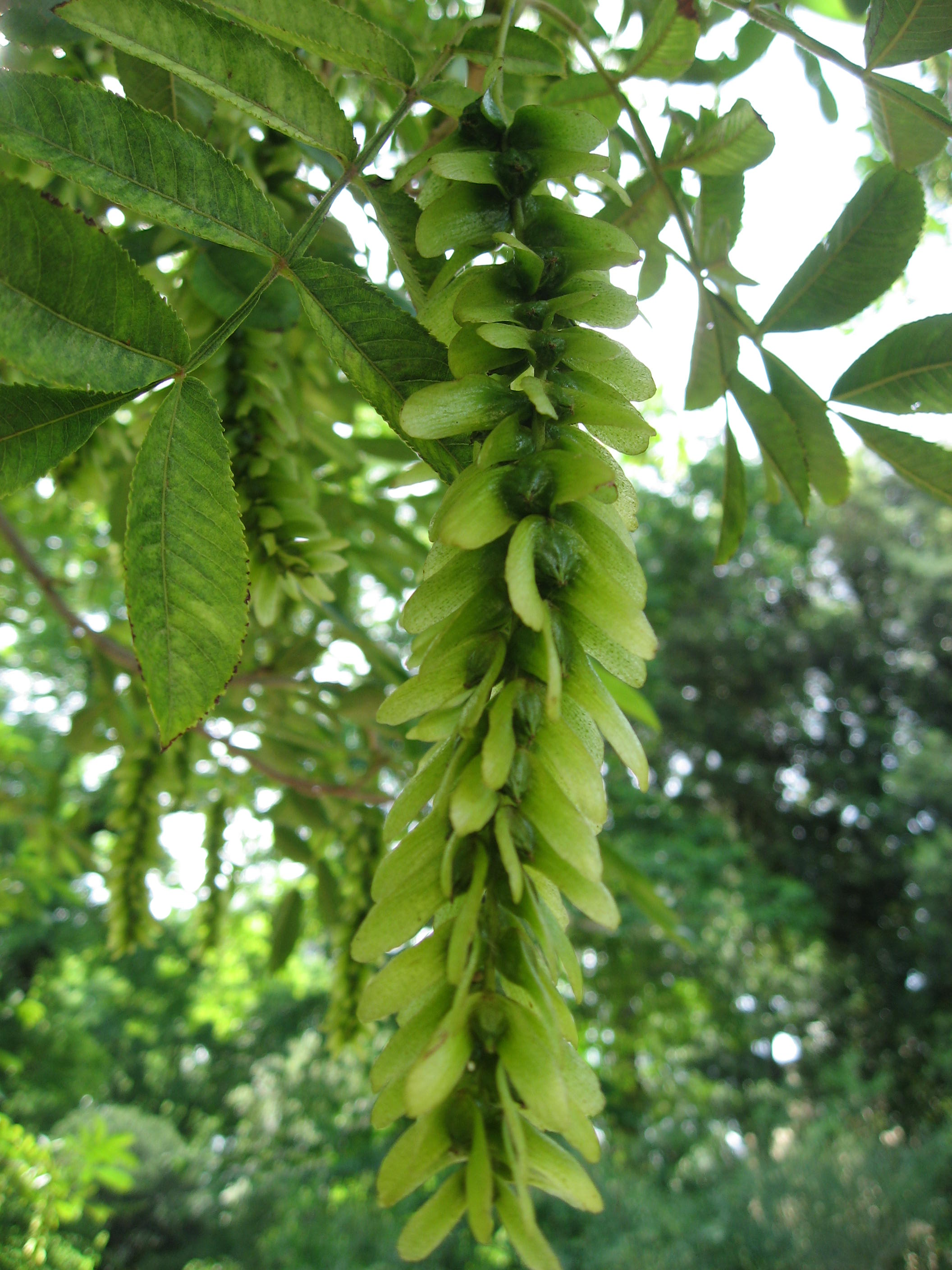 Pterocarya stenoptera in Giardino dei Semplici di Firenze Map: 43° 46' 45" N 11° 15' 39" E